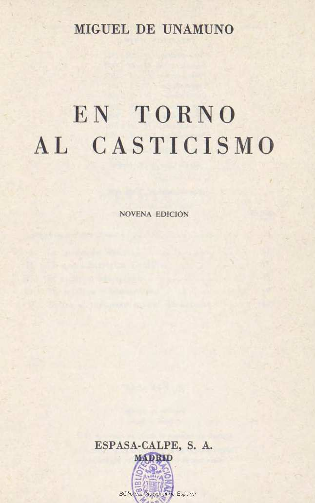 En torno al casticismo Miguel de Unamuno Autor: Unamuno, Miguel de (1864-1936) Fecha: 1979 Datos de edición: Madrid, Espasa Calpe